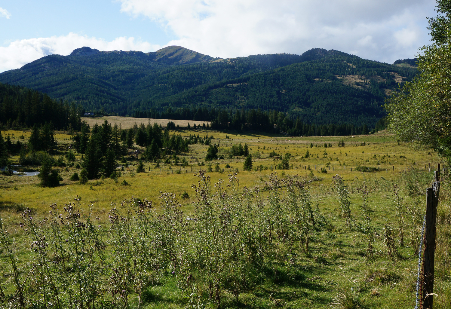 Flattnitzbach-Hochmoor This media shows the nature reserve in Carinthia with the ID NSG.017.